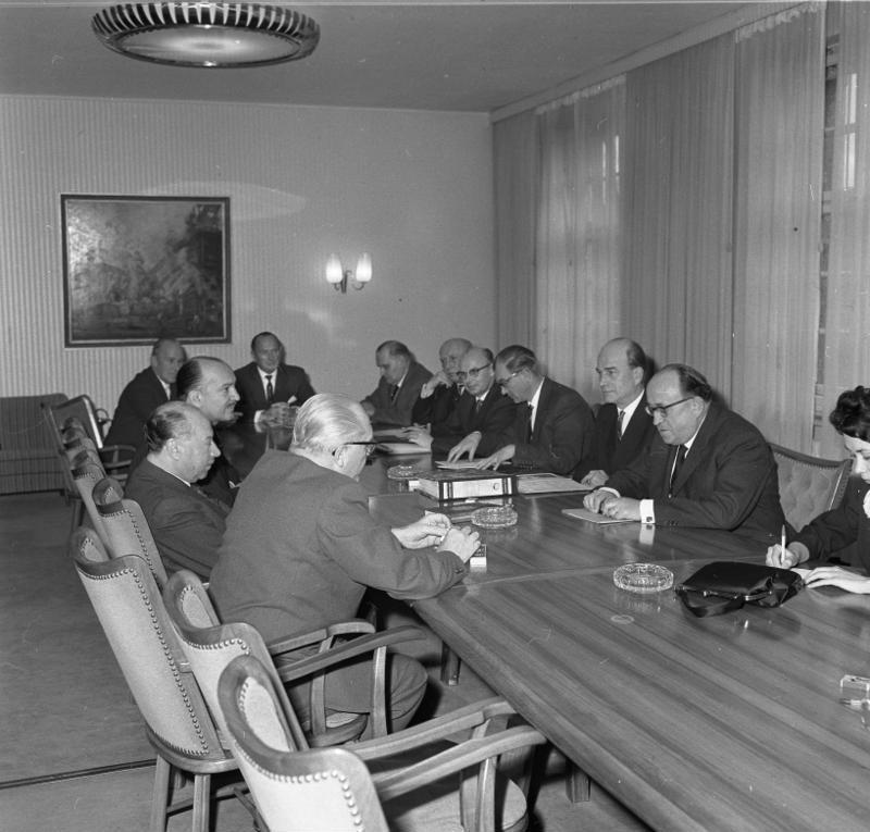 Empfang des irakischen Minister für Ölangelegenheiten, Mohamed Salman, durch St. Müller-Armack im Wirtschaftsministerium Im Bild (v.r.n.l.): Dolmetscherin des Auswärtigen Amts, Staatssekretär Prof. Dr. Müller-Armack, BWM, MinRat Dr. Kroog, BWM, MinDirigent Dr. Neef, BWM, MinRat Kling, BWM, MinDirigent Richter, BWM, links am Tisch Schmitz-Lenders, Salman, Suleyman